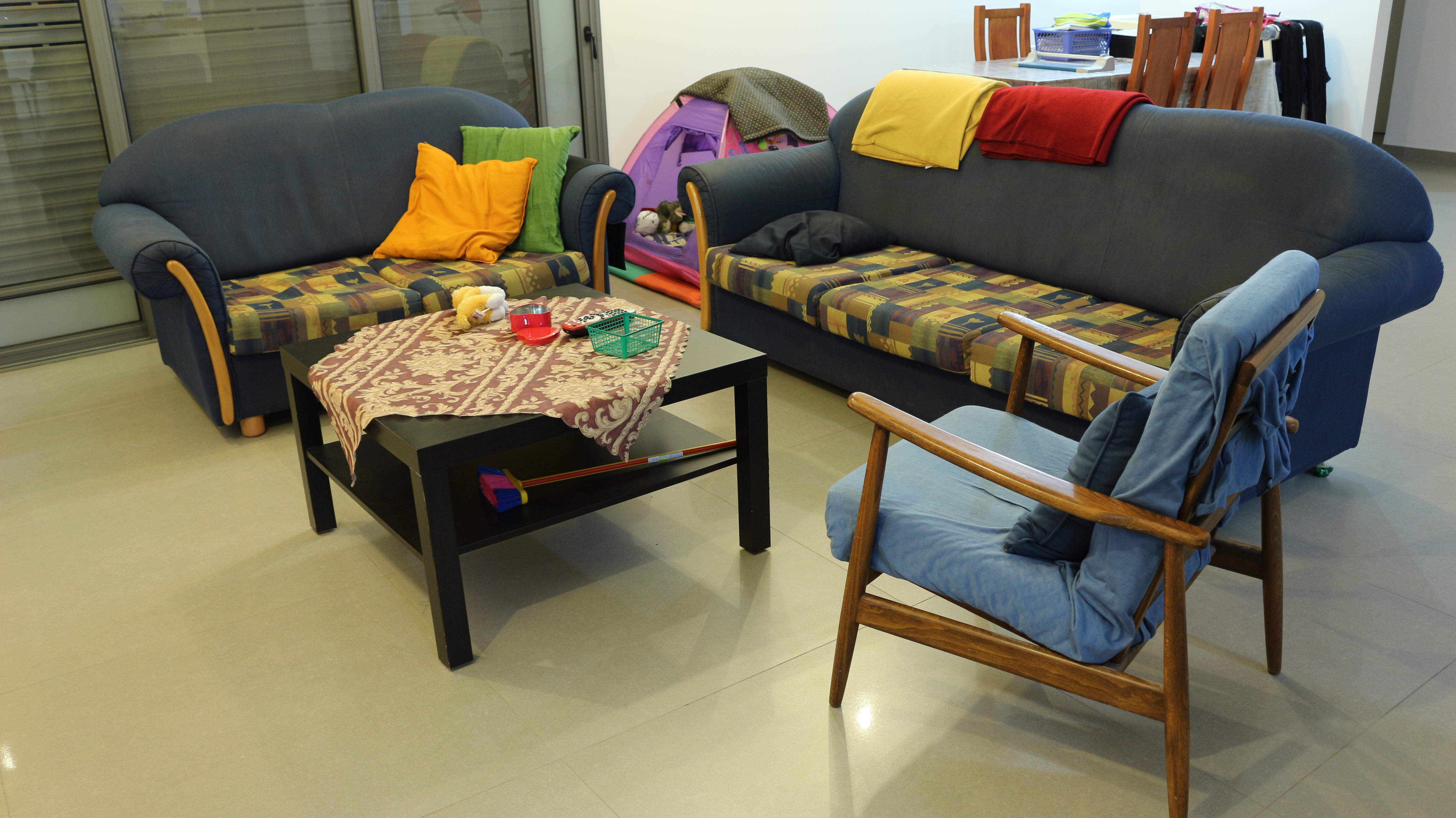 סלון ביתי